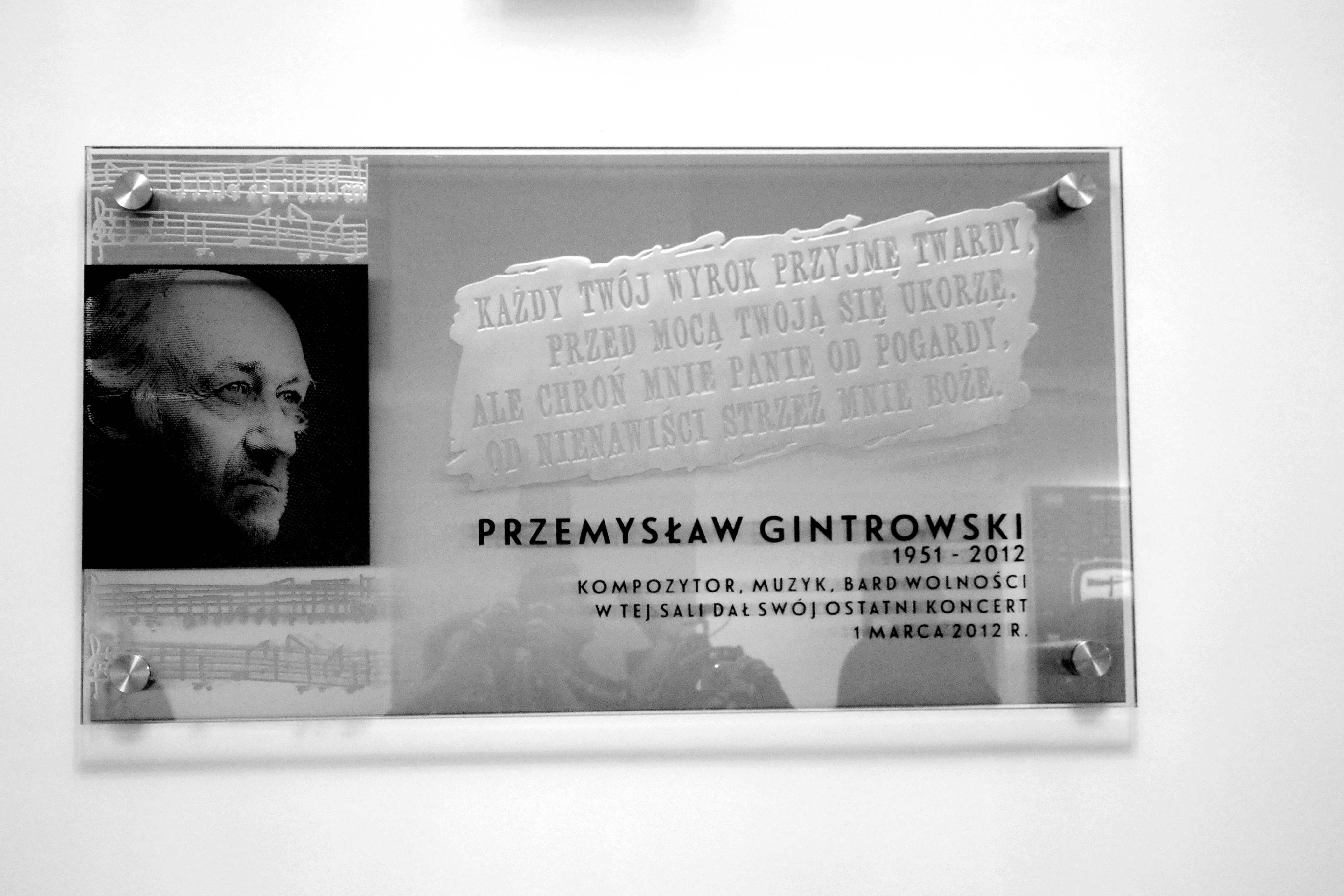 Odsłonięcie tablicy upamiętniającej barda Przemysława Gintrowskiego w Centrum Edukacyjnym IPN Przystanek Historia w Warszawie w 2 rocznicę śmierci artysty